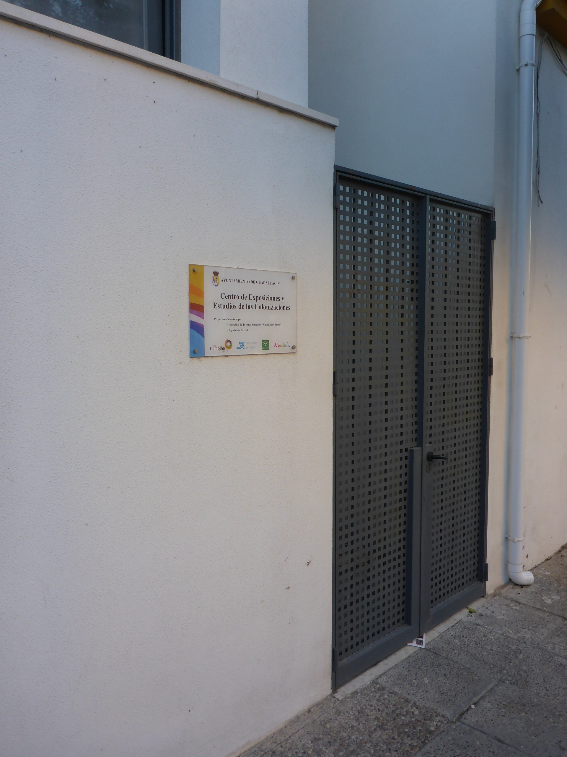 Guadalcacín, Jerez (Andalucia, España)